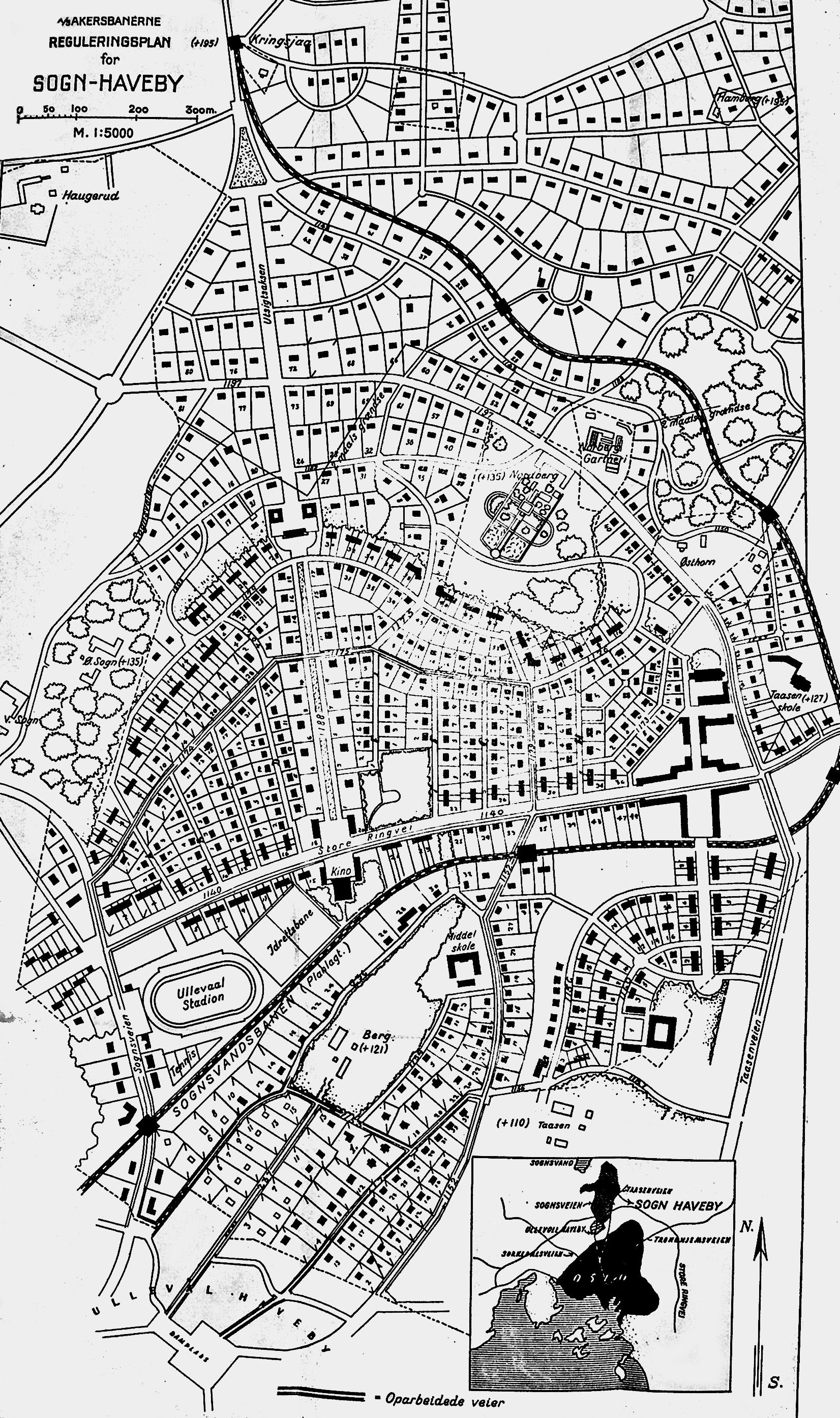 Reguleringsplan for Sogn haveby